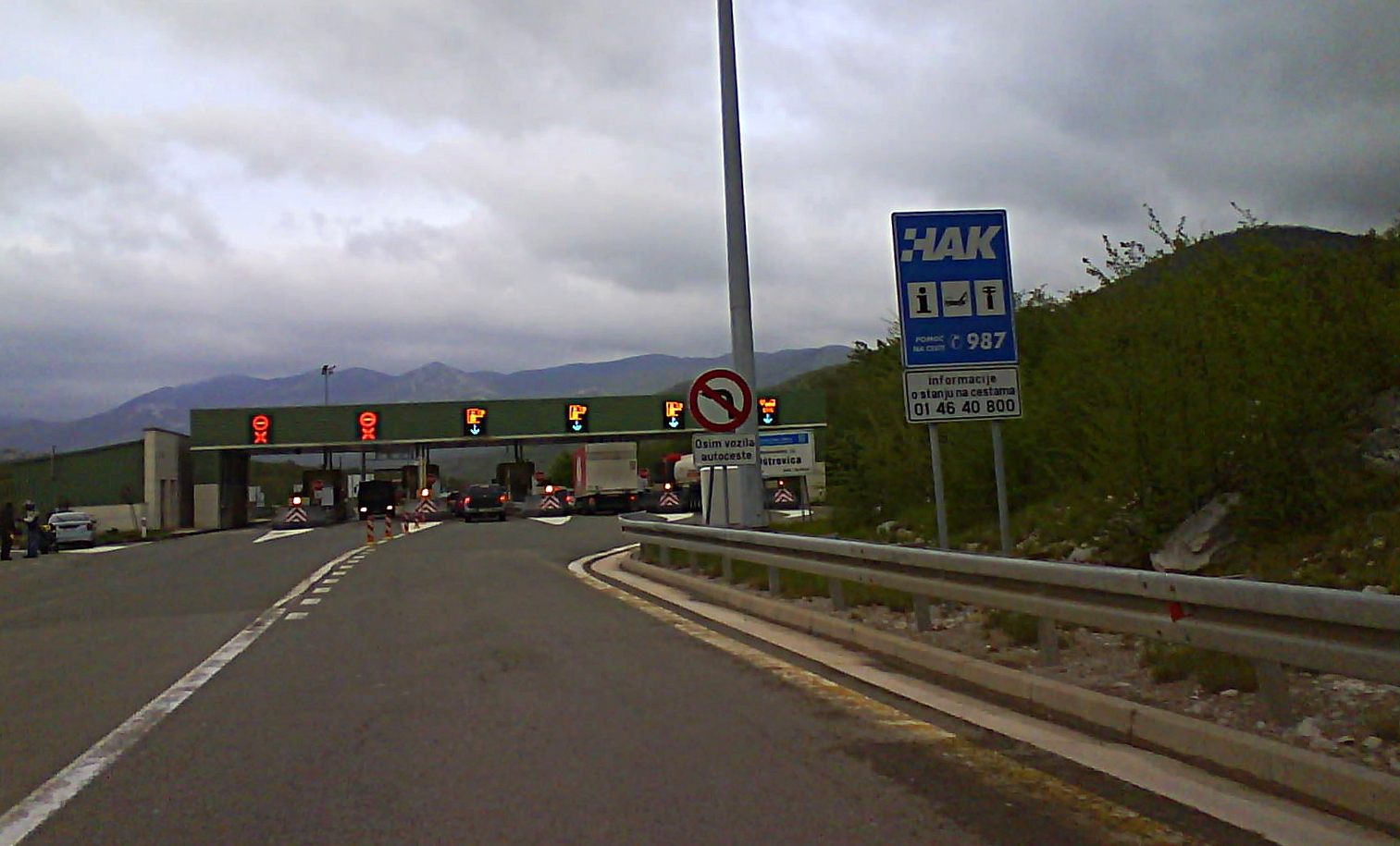 Izlaz Oštrovica